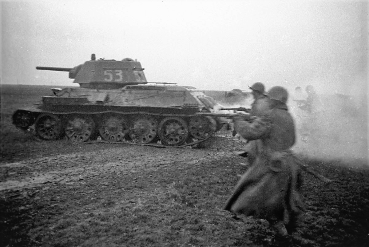 Наступление войск 3-го Украинского фронта на Белград. Одна из последних фотографий фотокорреспондента ТАСС В. Н. Иванова